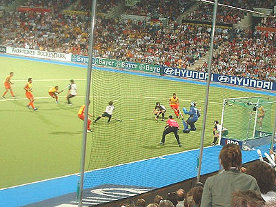 Hockey-WM, Halbfinale Spanien-Deutschland. Strafecke Spanien